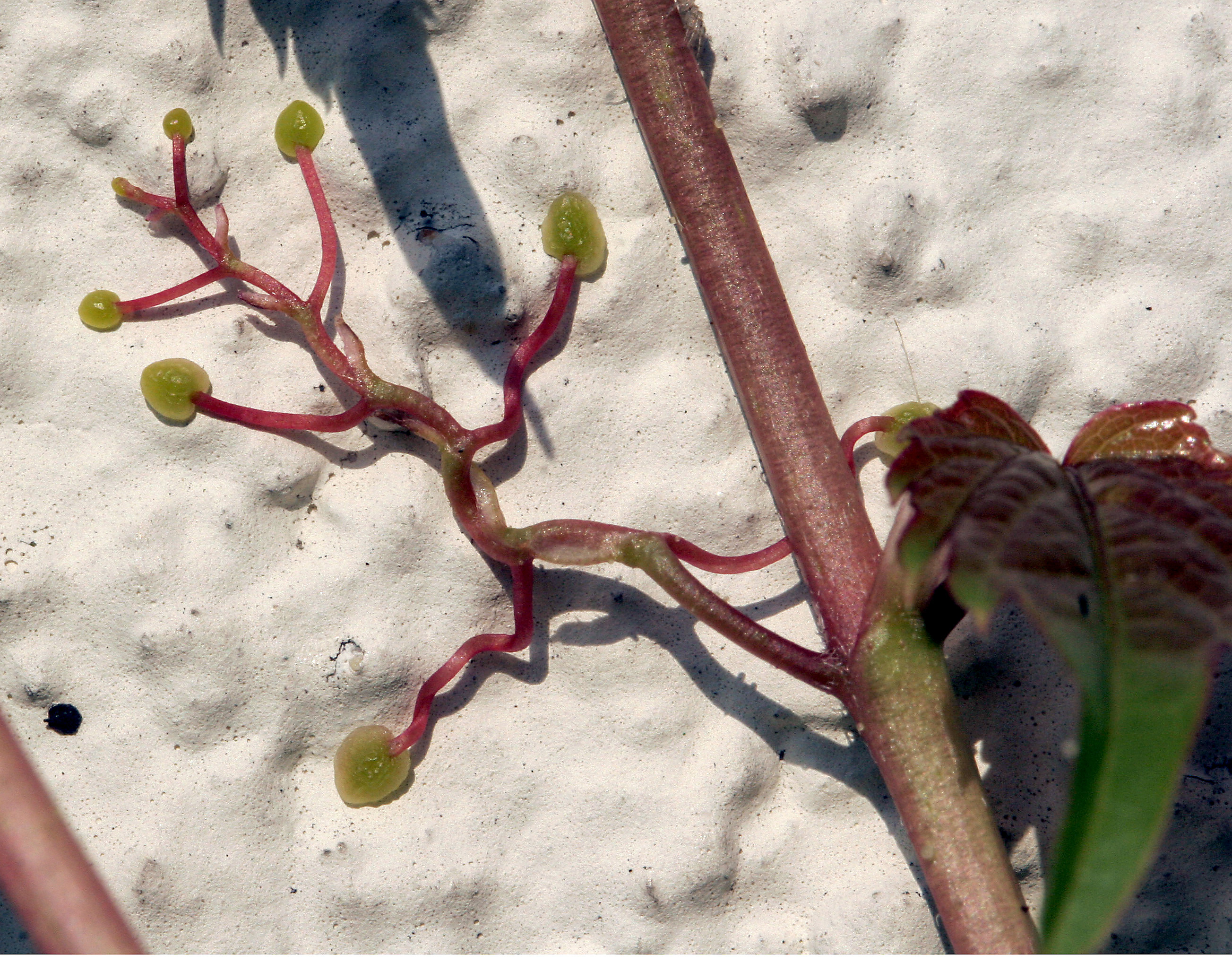 Haftscheiben der Dreispitzigen Jungfernrebe (Parthenocissus tricuspidata)